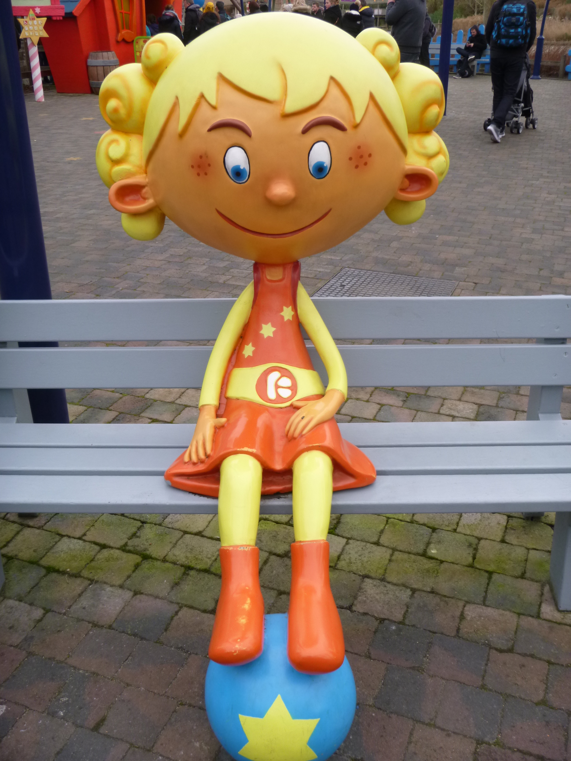 Kathy Tralalère à Plopsaland